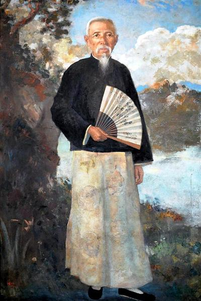 中文（台灣）: 林路（亦稱林志義）的肖像。